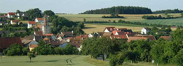 Altershausen